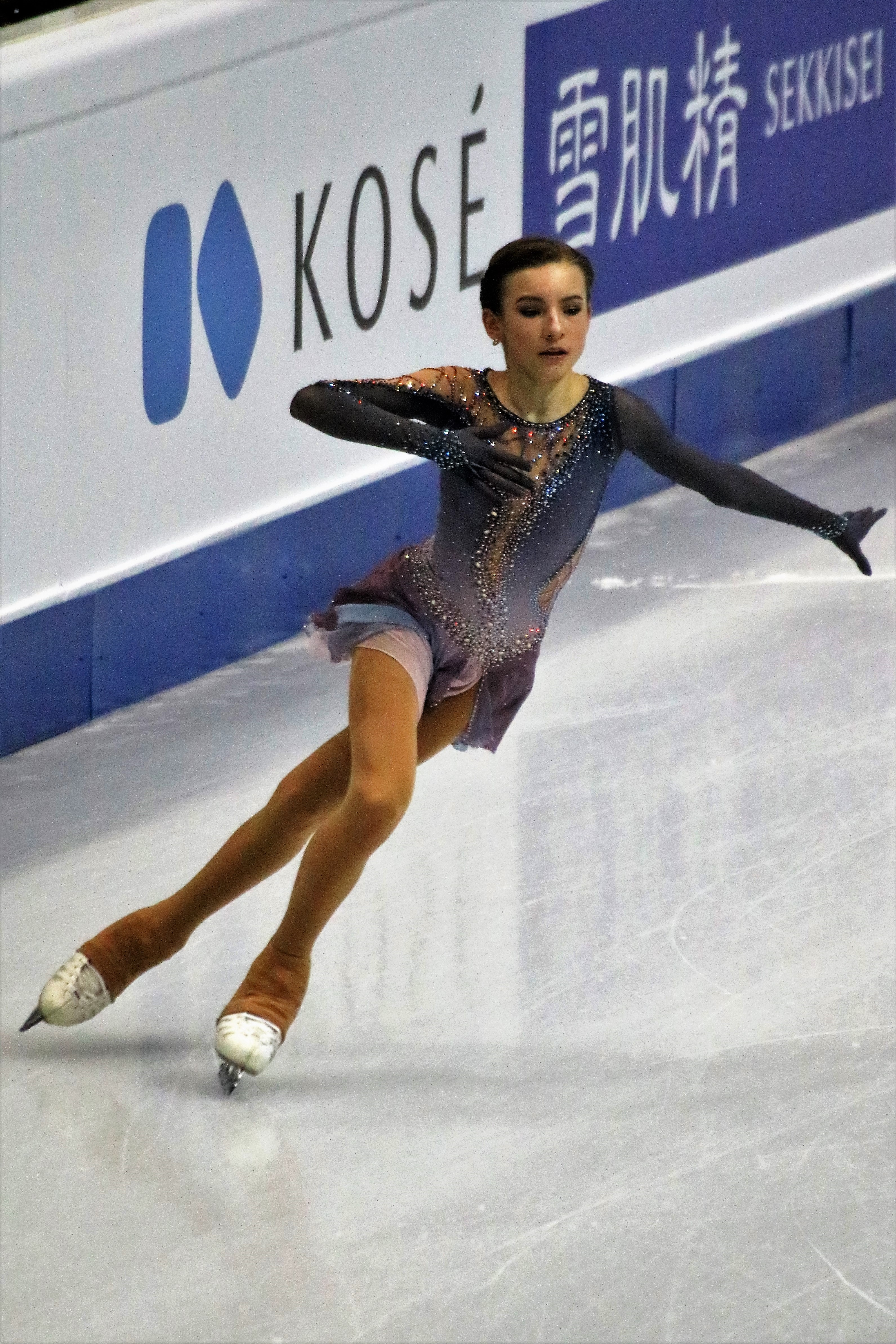 Дарья Усачева (Россия) на финале юниорского Гран-при 2019-2020